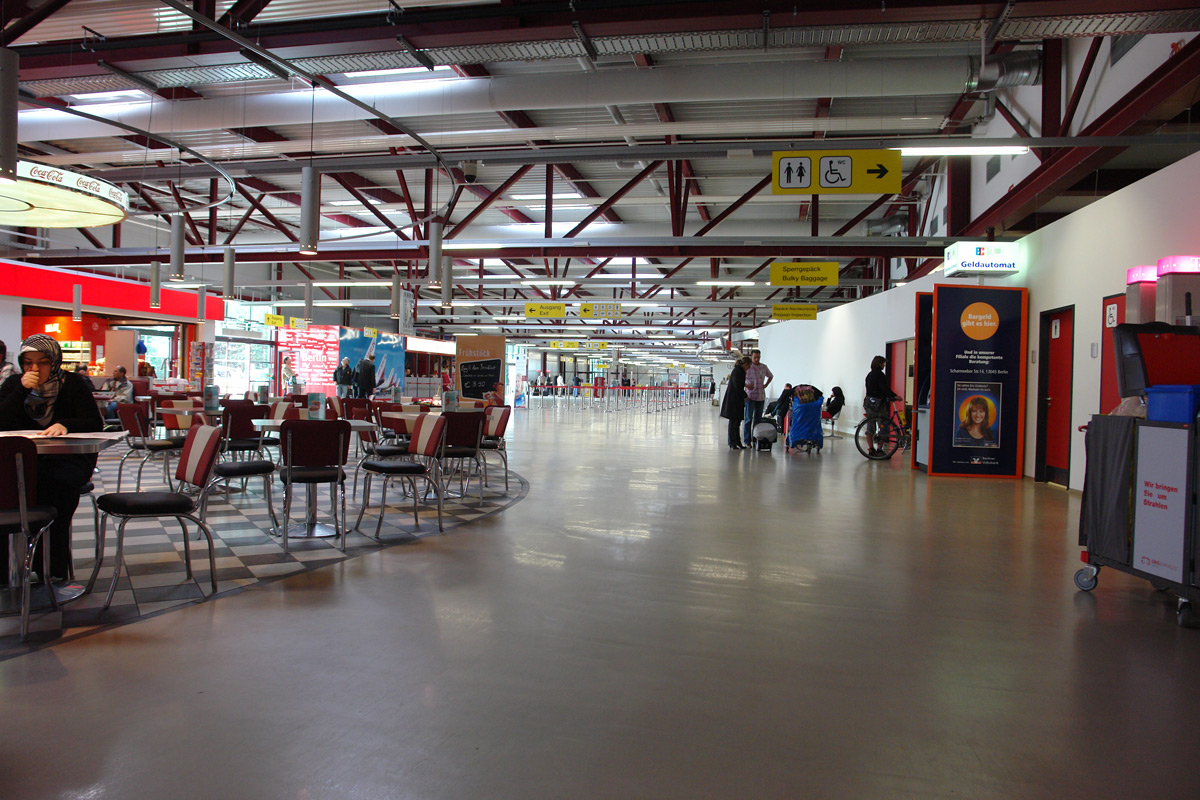 Innenansicht des neu errichteten Terminal C des Flughafens Berlin Tegel (TXL/EDDT).